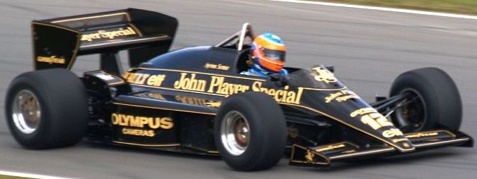 Lotus 97T 2007-ben. A Lotus 97T Donington 2007.jpg kép kisebbített változata